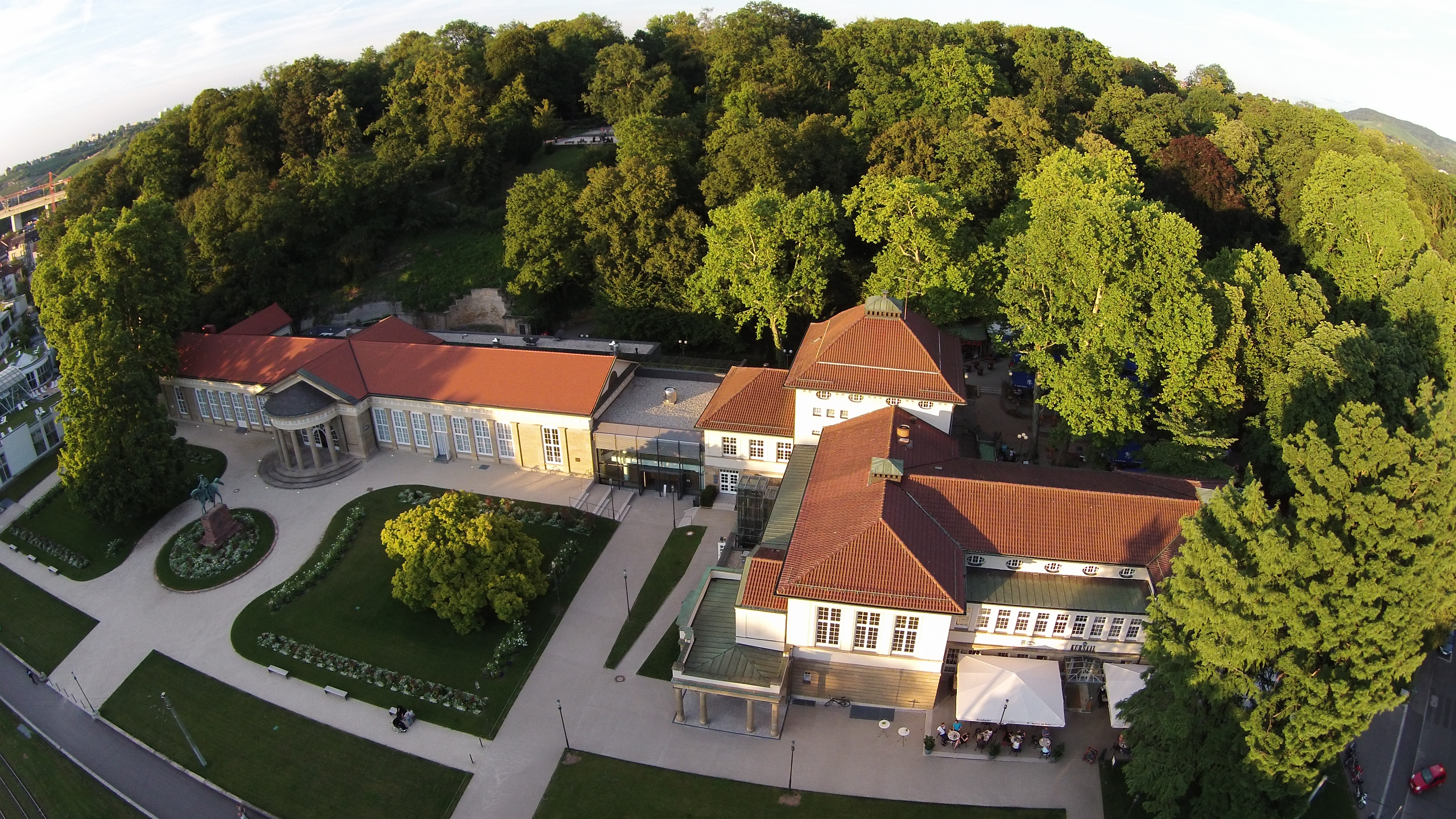 Kursaal Bad Cannstatt mit Quelle aus Richtung West. Rechter Hand Biergarten. Im Hintergrund der Park